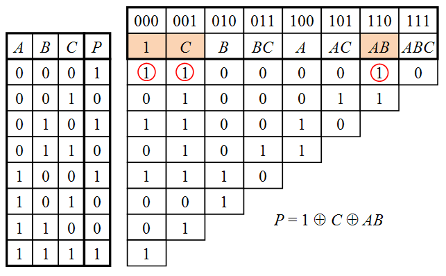 Преобразование таблицы истинности в полином Жегалкина методом треугольника